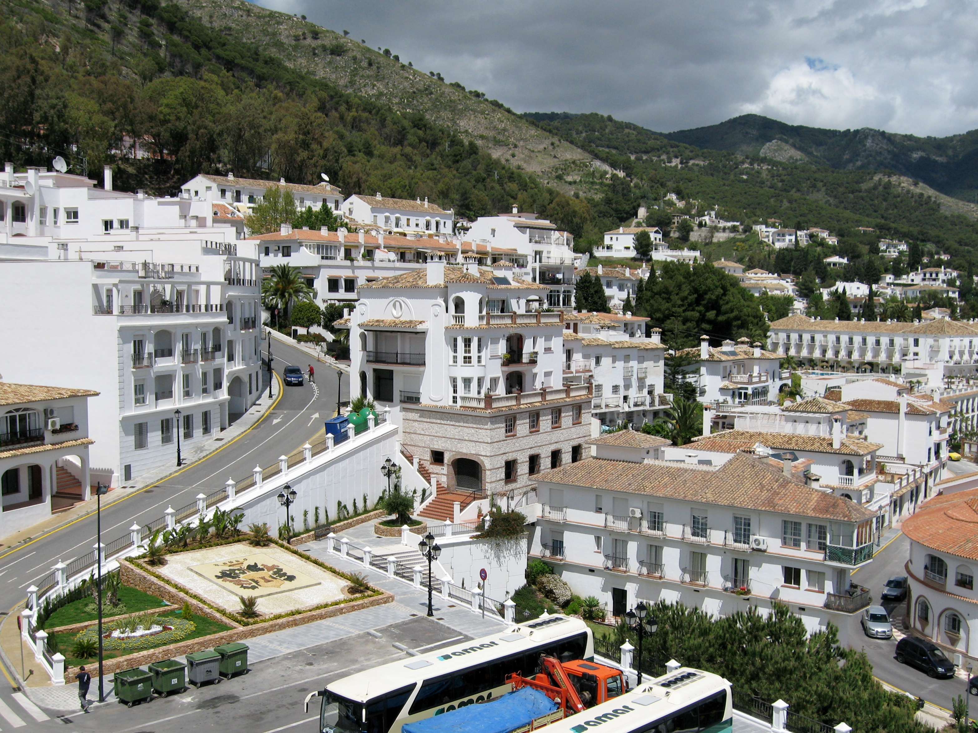 Mijas (Calle Olivar D. Pablo), Provinz Málaga, Andalusien, Spanien